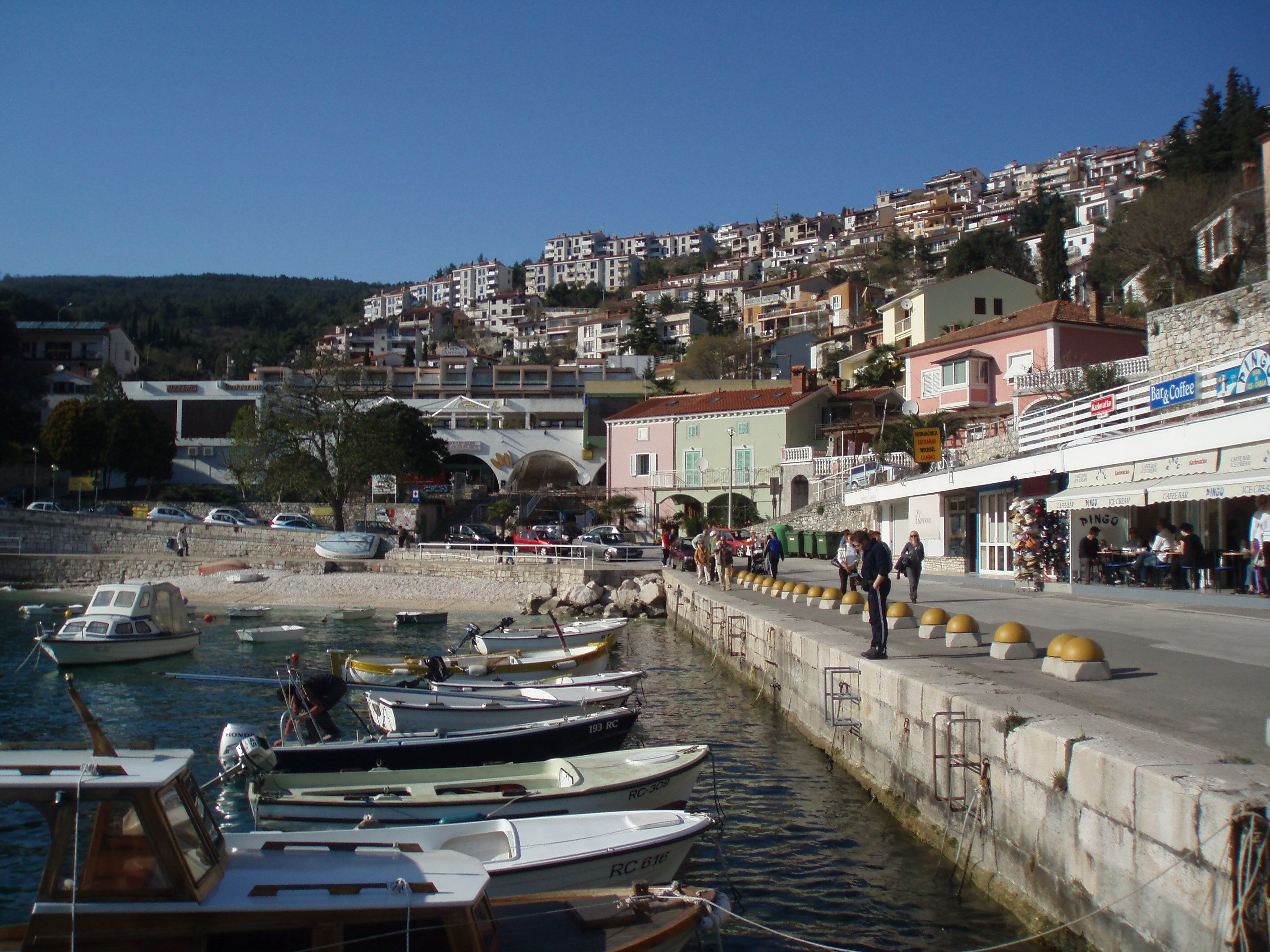 Grad Rabac